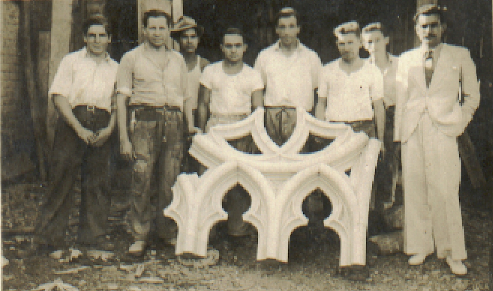 Equipe responsável por esculpir as molduras da janela. O segundo da esquerda para a direita se chamava Angelo Palazzi e o quinto da esquerda para a direita, bem ao centro da peça, se chamava João Baccaro.